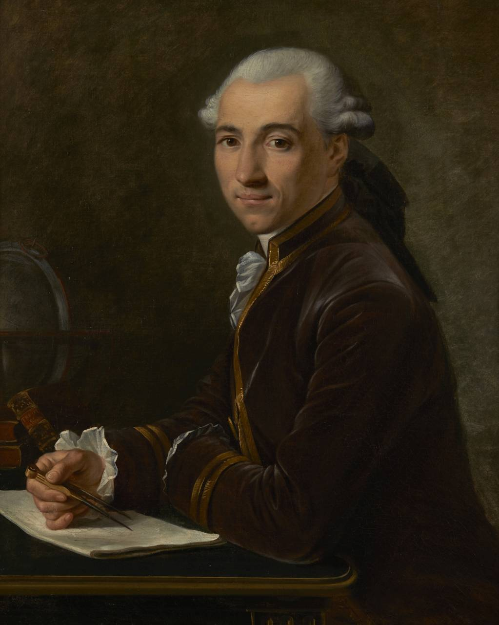 Nicolas-Bernard Lepicie, Retrato de un oficial de la marina francesa, óleo sobre lienzo, 81 x 64 cm, San Sebastian, Museo de San Telmo